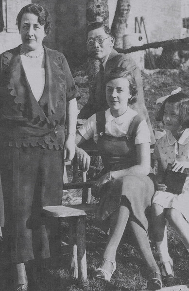 ジュネーブ時代の東郷家 エディータ・茂徳とウルズラ